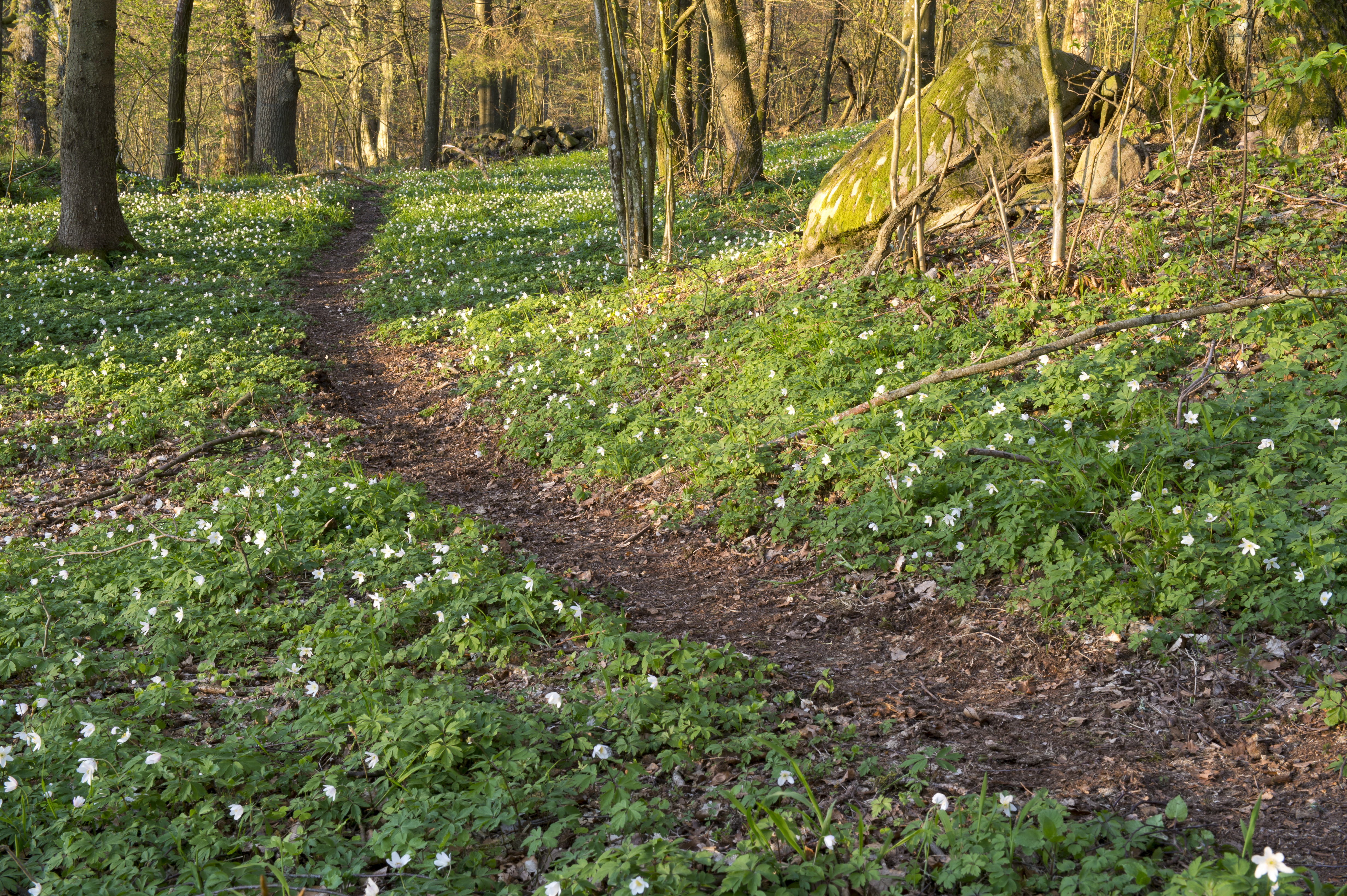 Fulltofta strövområde är Stiftelsen Skånska Landskaps största område för friluftsliv.